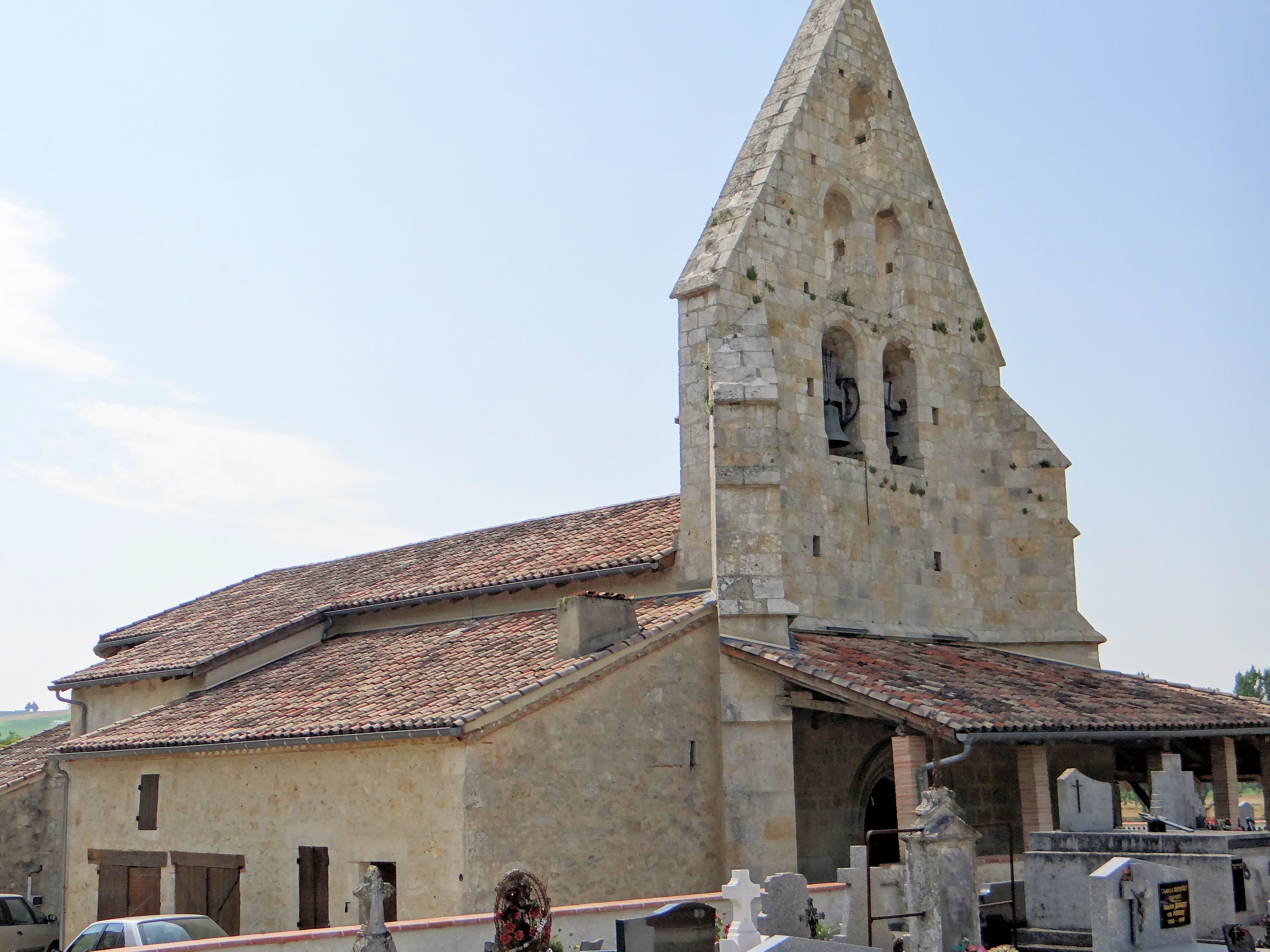 Saint-Cirice - Église Saint-Cyr-et-Sainte-Juliette - Ensemble